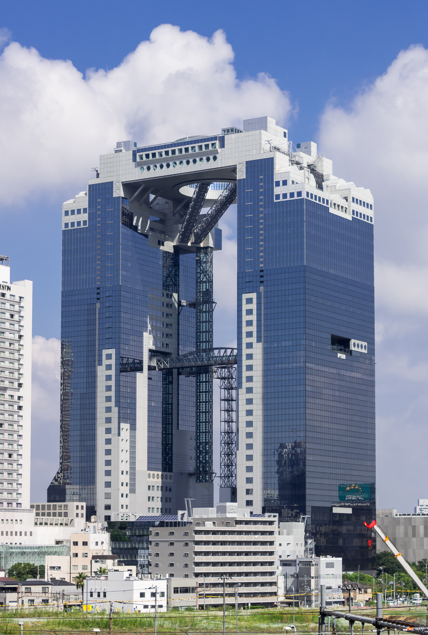 梅田スカイビル（大阪府大阪市北区）